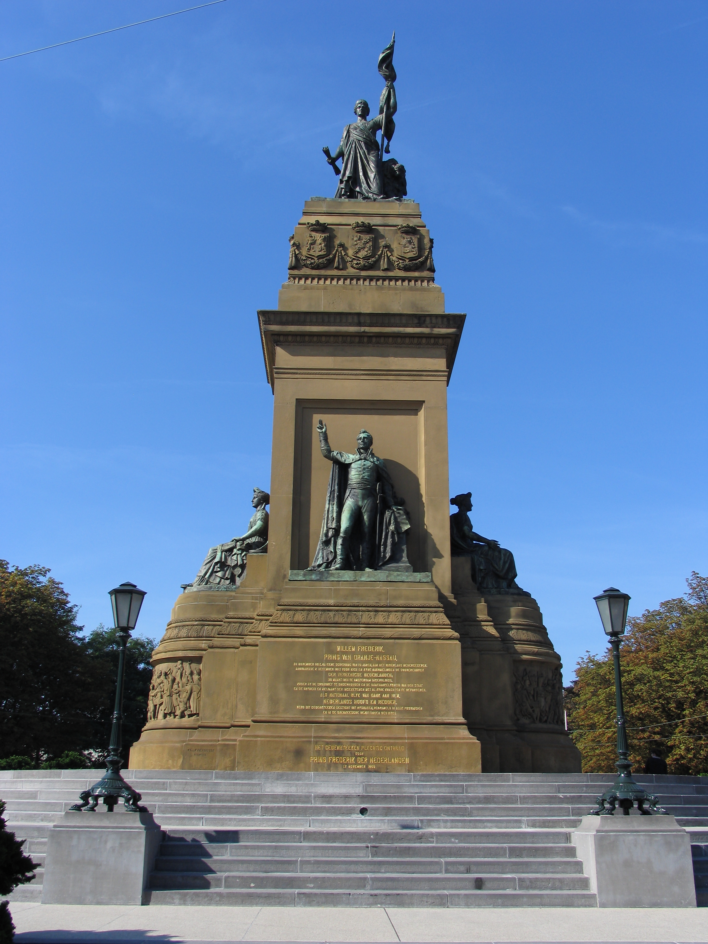 Plein 1813, monument in Willemspark, Den Haag